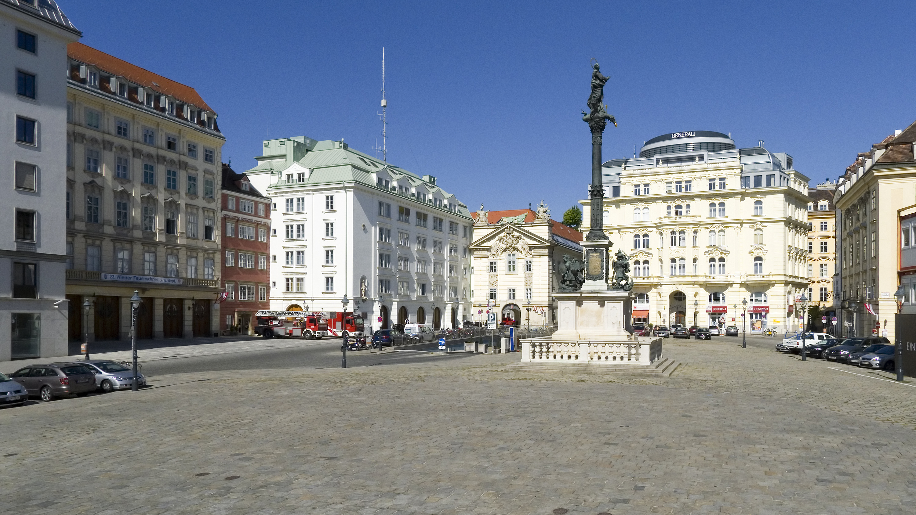 Am Hof in Wien 1 Richtung Nordosten